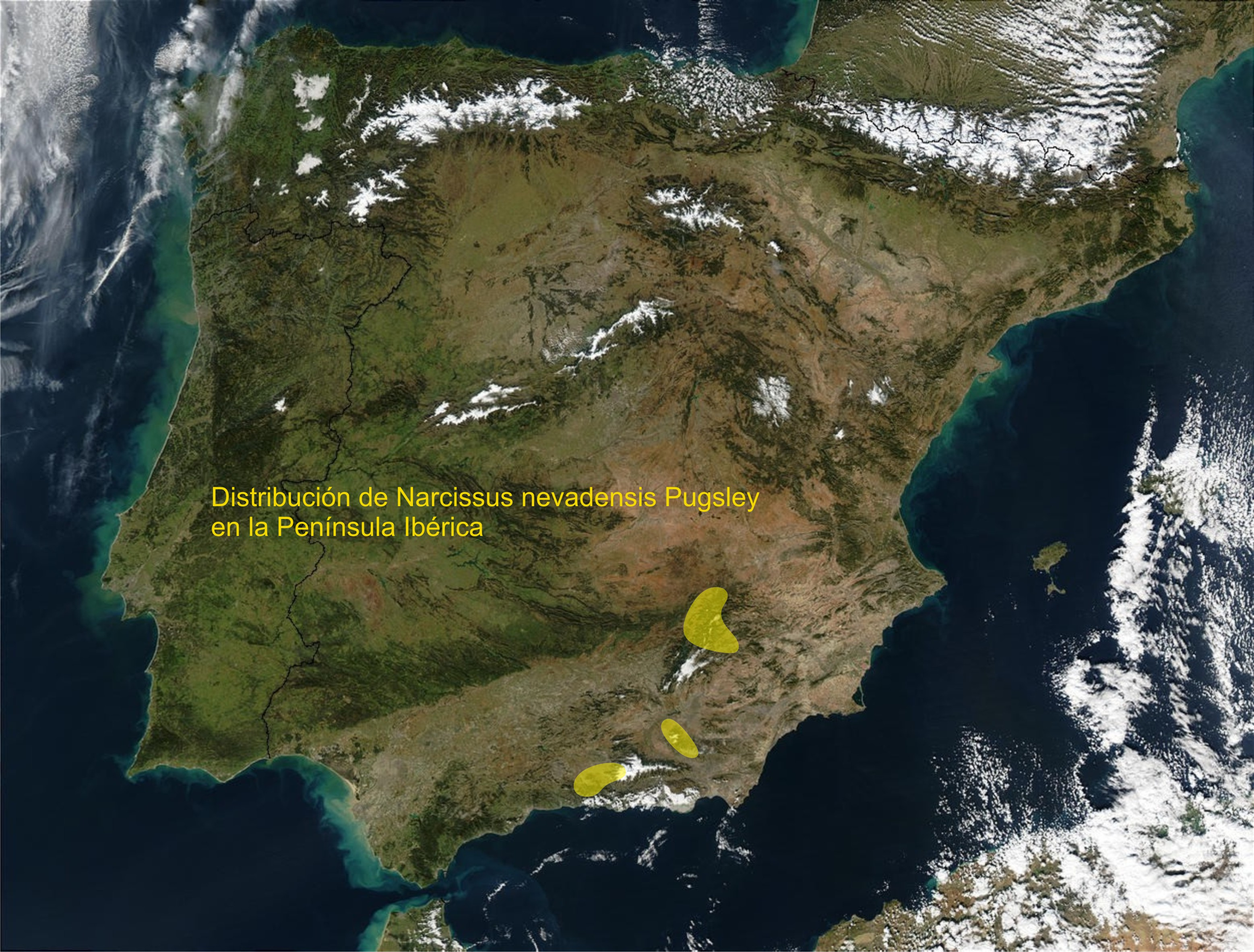 Área de distribución de Narcissus nevadensis Pugsley en la Península Ibérica.